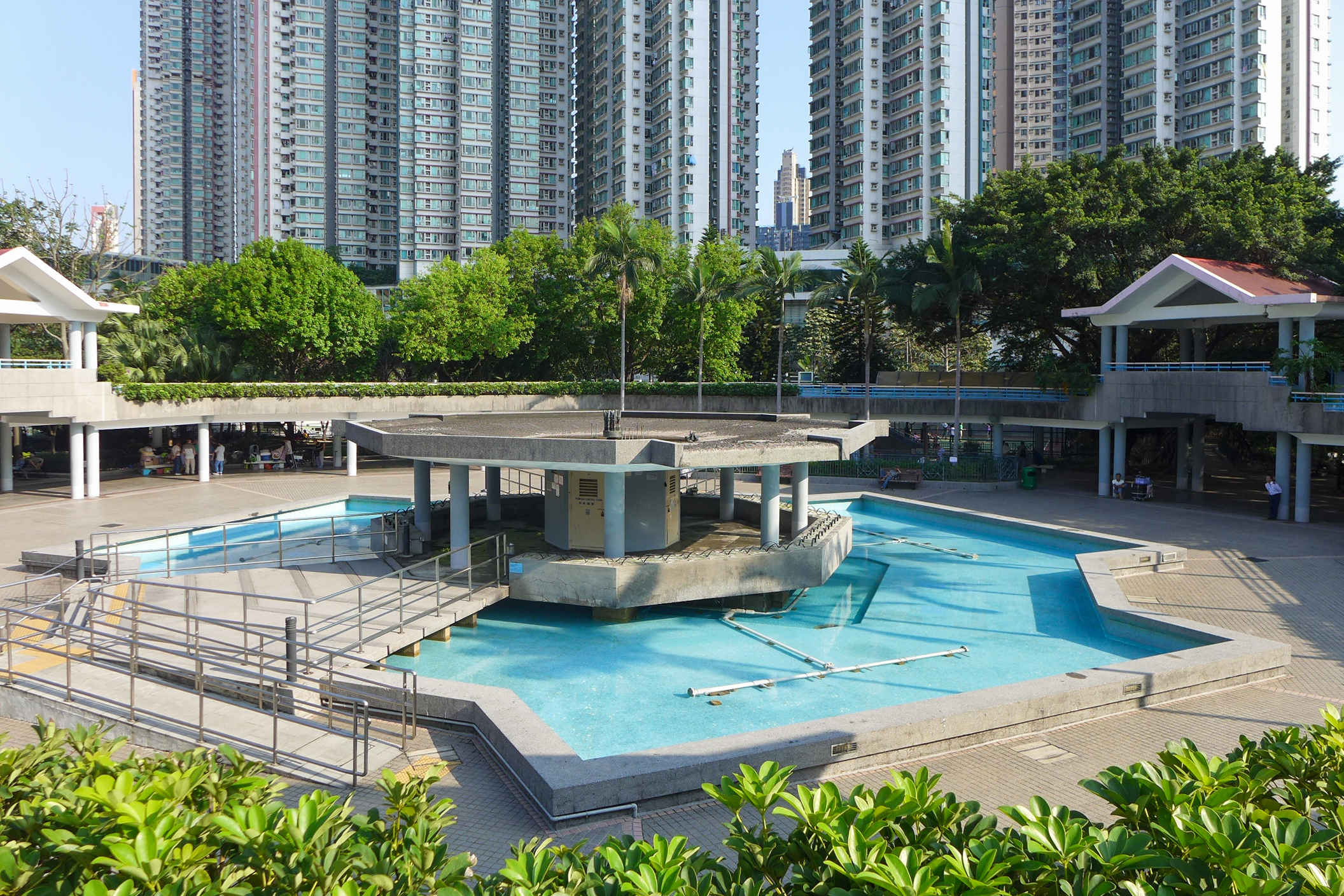 Tung Chau Street Park